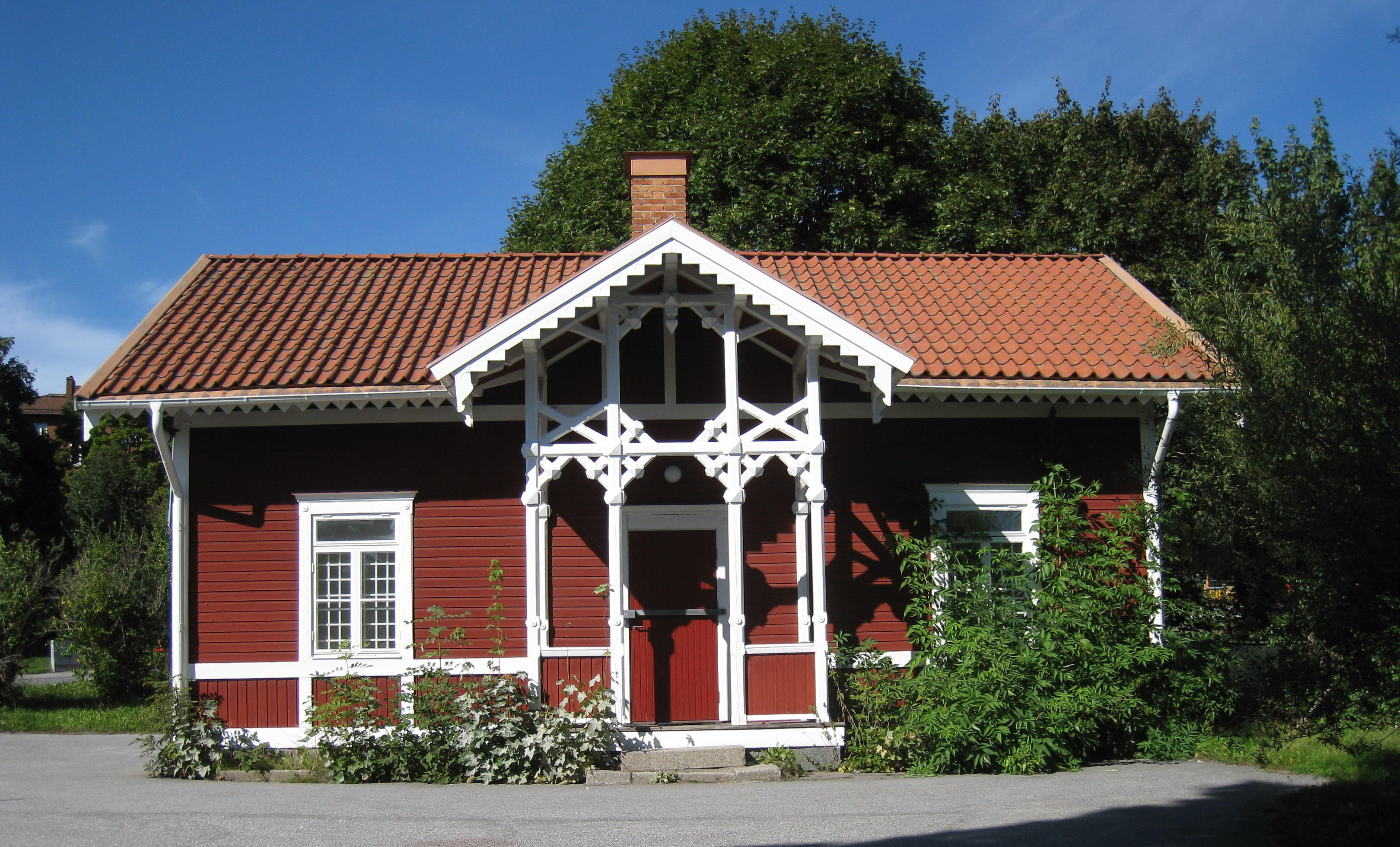 Lilla Ängby gård på Blackebergsvägen i Blackeberg i Bromma, väster om Stockholm. Torpstugan ligger vid gränsen till Södra Ängby och ligger utmed 1600-talets landsväg mellan huvudstaden och färjeläget vid Tyska Botten.